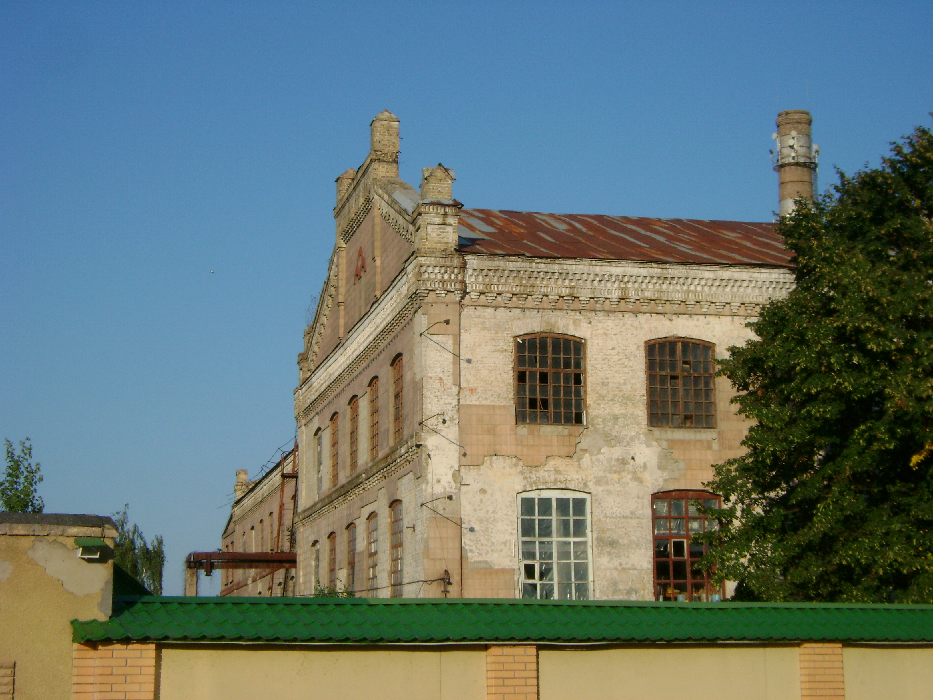 Рафінадний завод (мур.), Черкаси, вул. Добровольського, 1